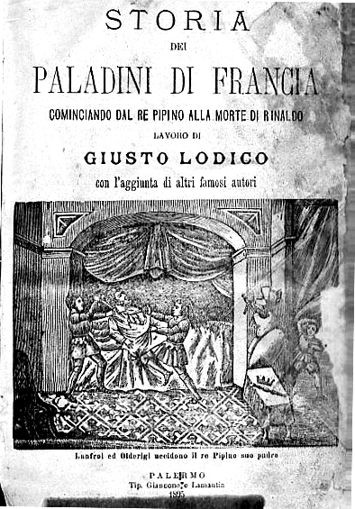 Storia dei Paladini di Francia, frontespizio del vol. I della ristampa intrapresa a partire dal 1895, con le aggiunte di Giuseppe Leggio al testo originale di Giusto Lodico.